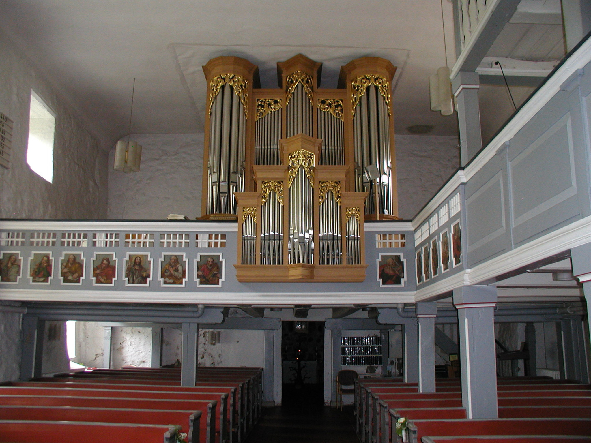 Orgel in St. Johannis, Salzhausen, Landkreis Harburg